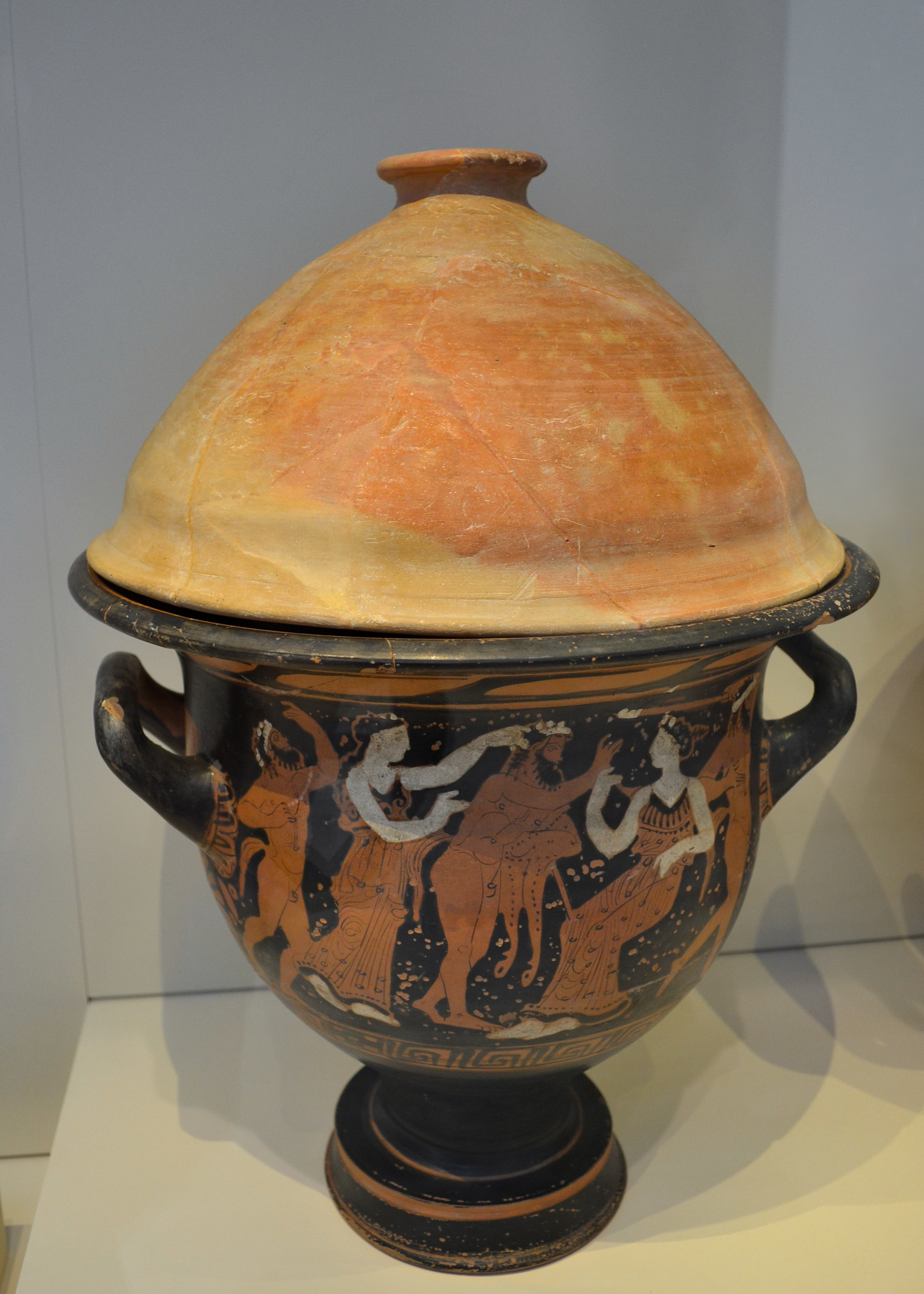 Cara A de una crátera de campana de la Necrópolis de Villaricos (Cuevas del Almanzora, Almería). Representa a Ariadna con la piel pintada lde blanco, sentada, que atrae la atención del tíaso o comitiva dionísiaca. El resto de personajes está de pie: detrás de Ariadna baila un sátiro con una antorcha encendida y delante de Ariadna hay otro sátiro que se dirige hacia ella con la piel sobre un brazo. Detrás de ese sátiro hay una ménade, también pintada la piel de blanco, y detrás de esta hay un sátiro bailando con la cabeza vuelta hacia el cielo; en la escena se representa la aceptación de Ariadna en el tíaso dionisíaco. Lugar de Producción: Grecia 375-350 a. C. Altura: 34,10 cm; diámetro base: 16,60 cm; diámetro boca: 36,70 cm. Nº inv. 1935/4VILL/T52-I/1. Museo Arqueológico Nacional de España.